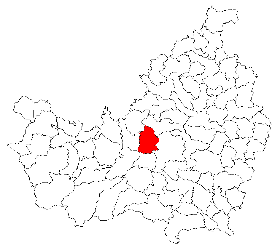 Comuna Baciu, judeţul Cluj Licensing Afbeelding:Baciu jud Cluj.png